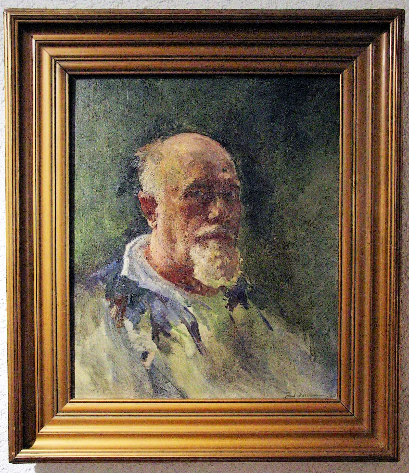 Künstler Paul Herrmann, Selbstportrait 1930